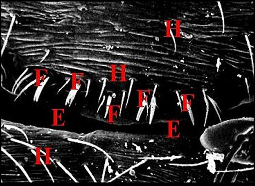 Fusules épigastriques d' Araniella cucurbitina en vue globale au microscope électronique à balayage